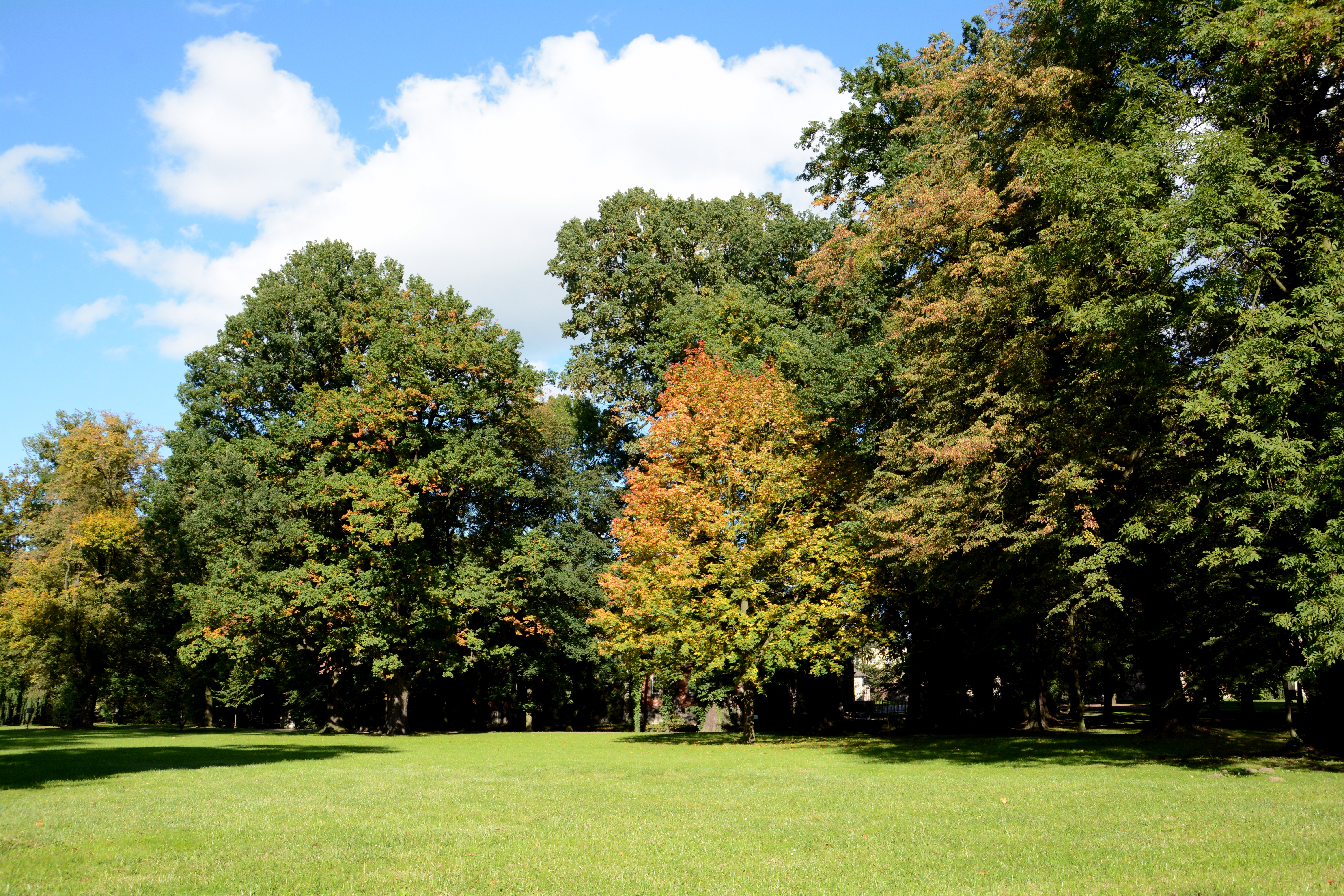 Park w Strzelcach opolskich, jesień